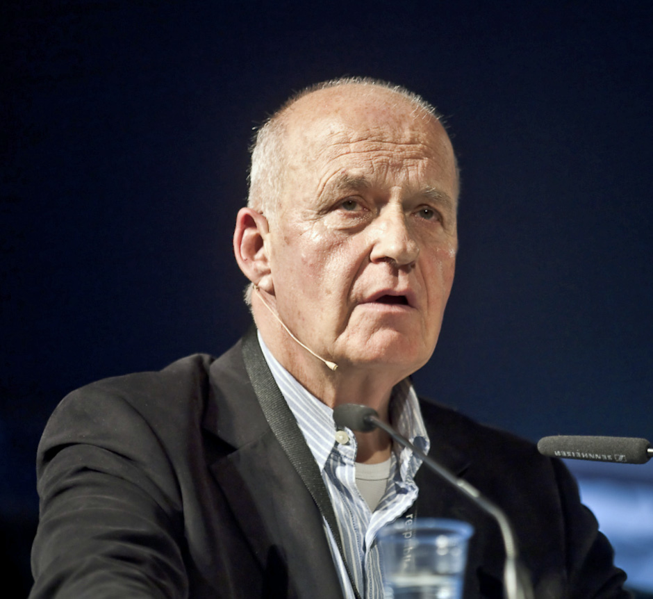 Götz Werner bei seinem Vortrag über die "Revolution im Kopf" auf der re:publica. Photo by Daniel Seiffert